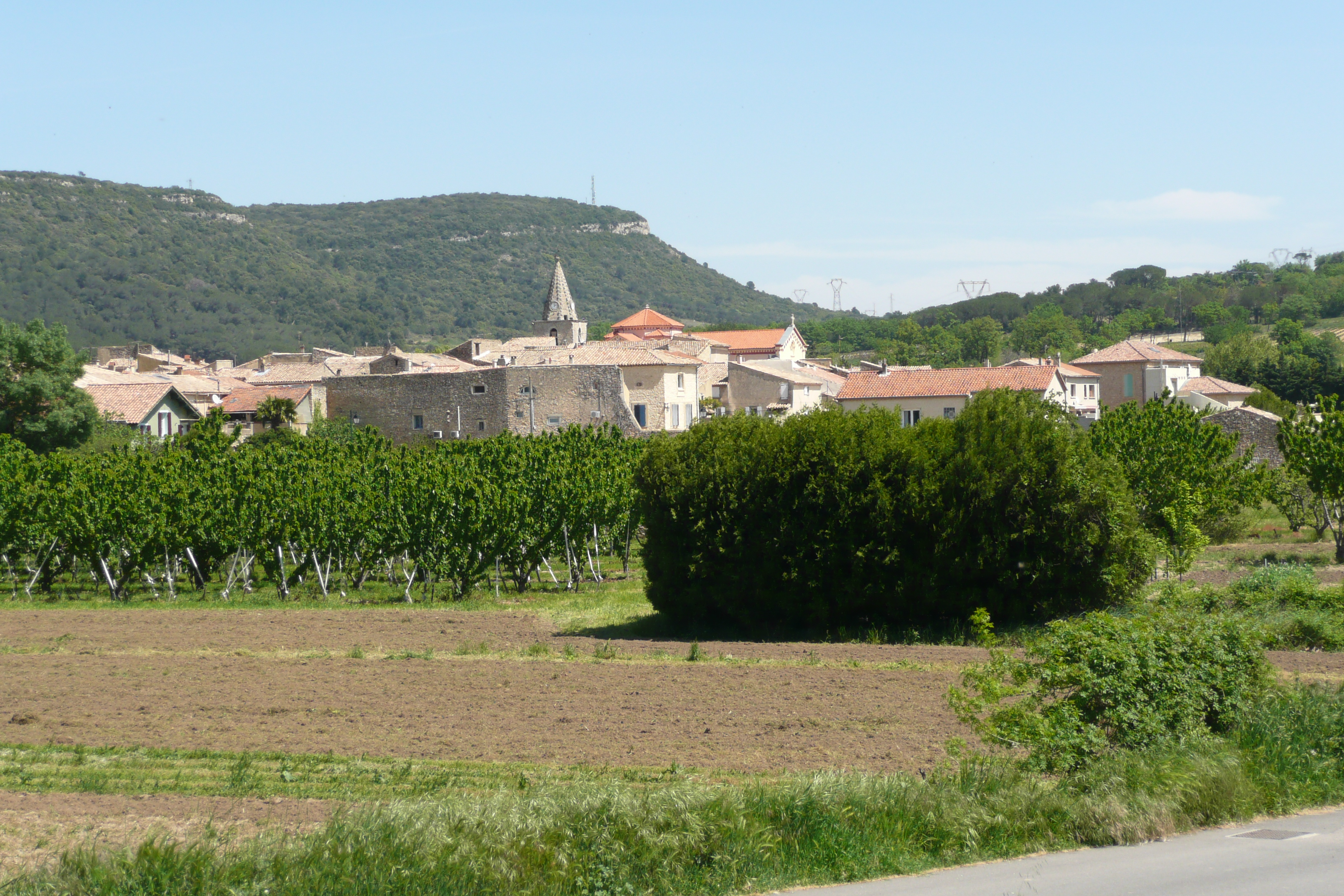 Vue sur Chusclan.